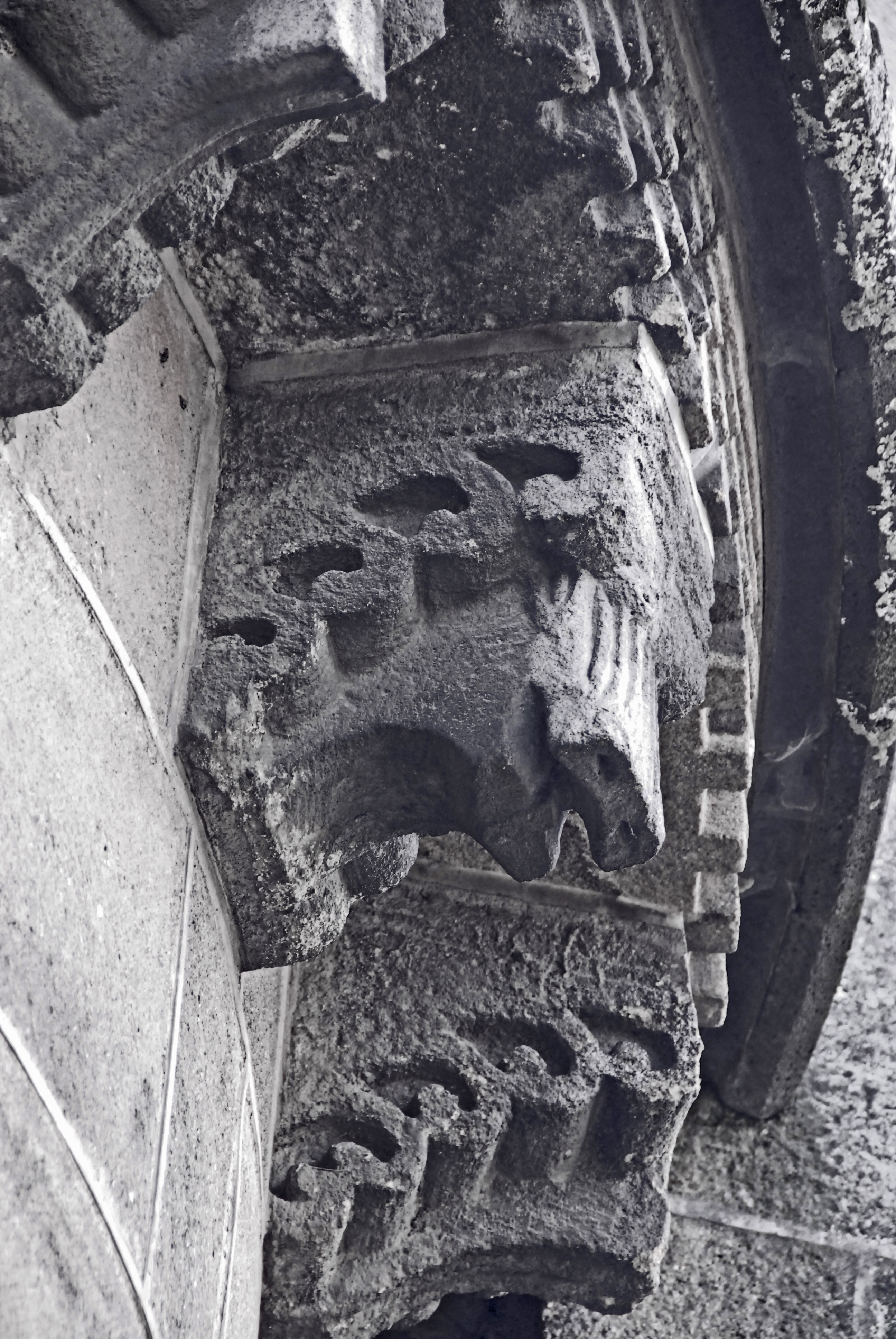 St-Saturnin (Puy-de-Dôme),Traufgesims Chorumgang